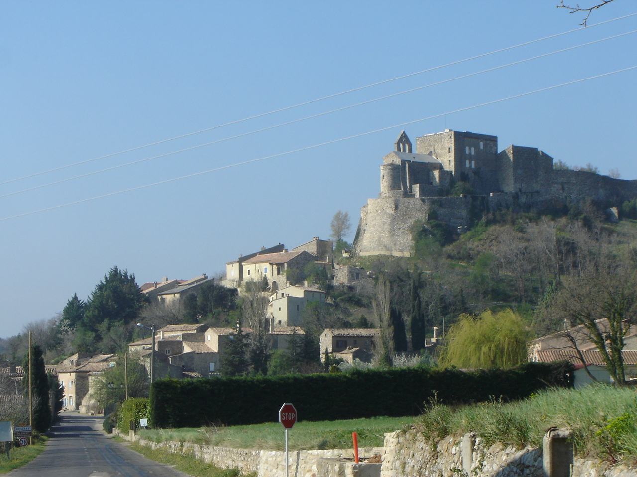 Roussas, le village, le château